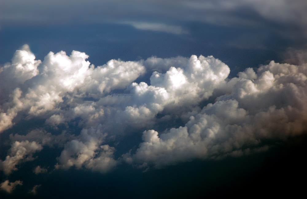 മേഘം